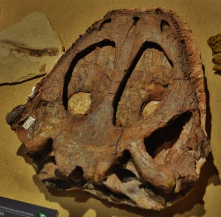 Fossil of Yuanansuchus, an extinct amphibian- Picture at Paleozoological Museum of China